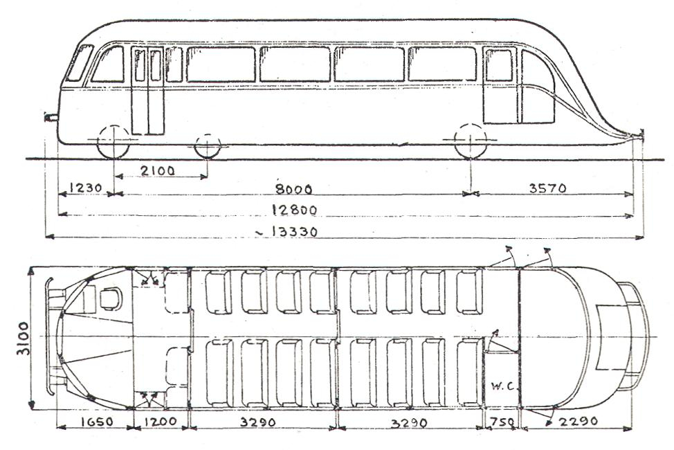 V.B. C-m 109 Zeichnung / 1935